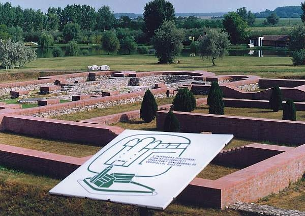 Szer-monostor és romkert.